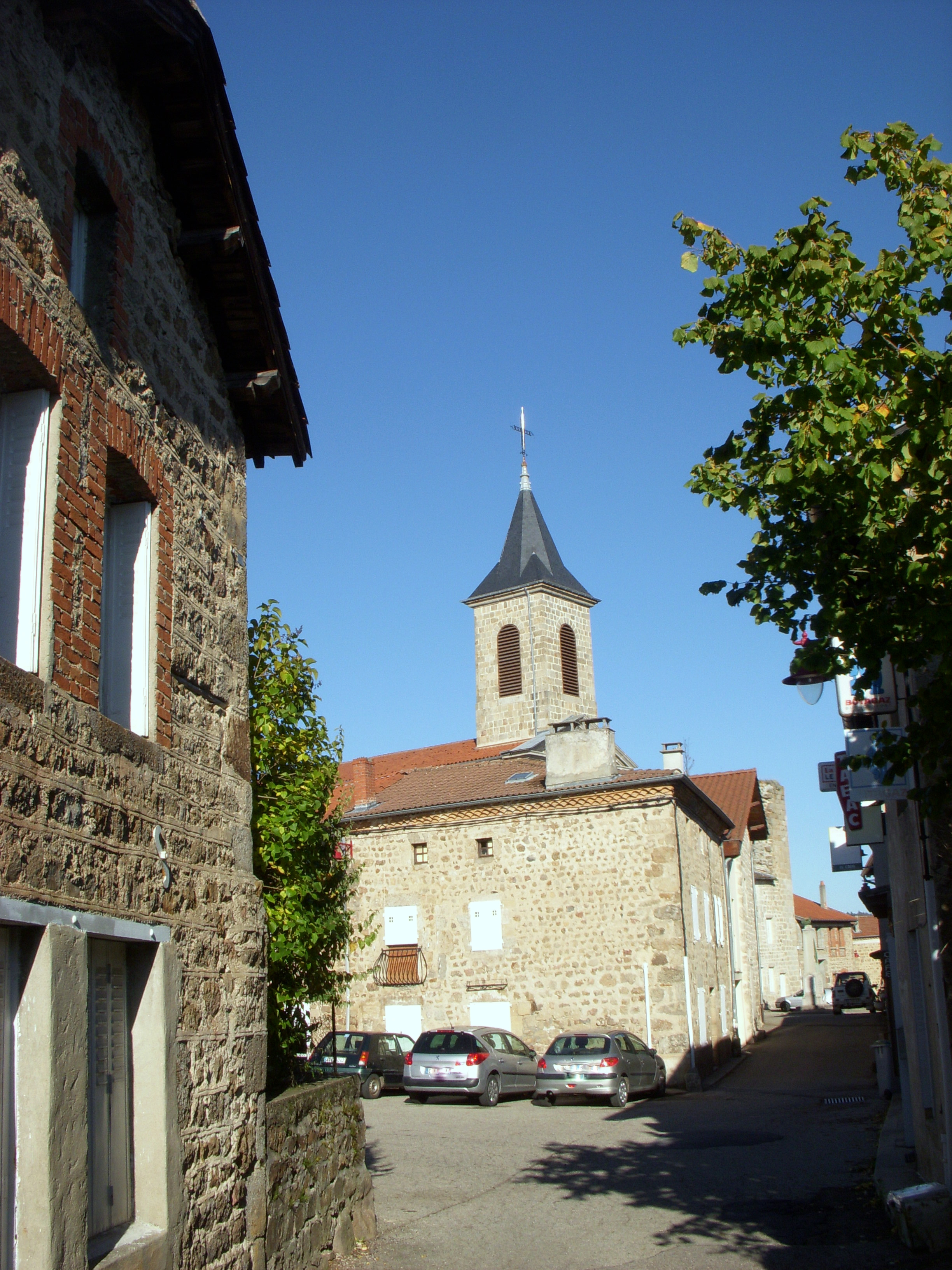 Apinac